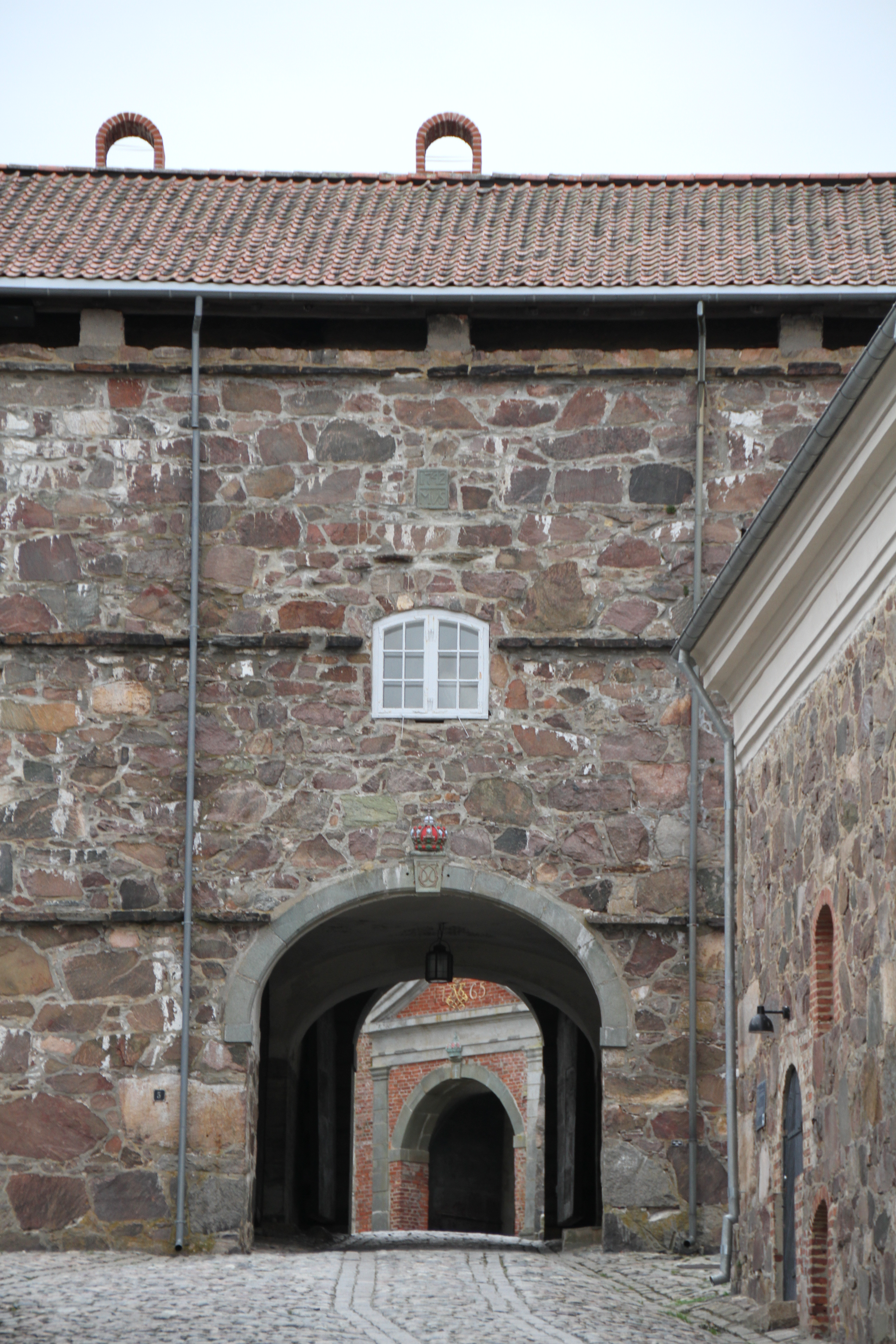 Fredriksten fortress in the city of Halden (Østfold), southeastern Norway